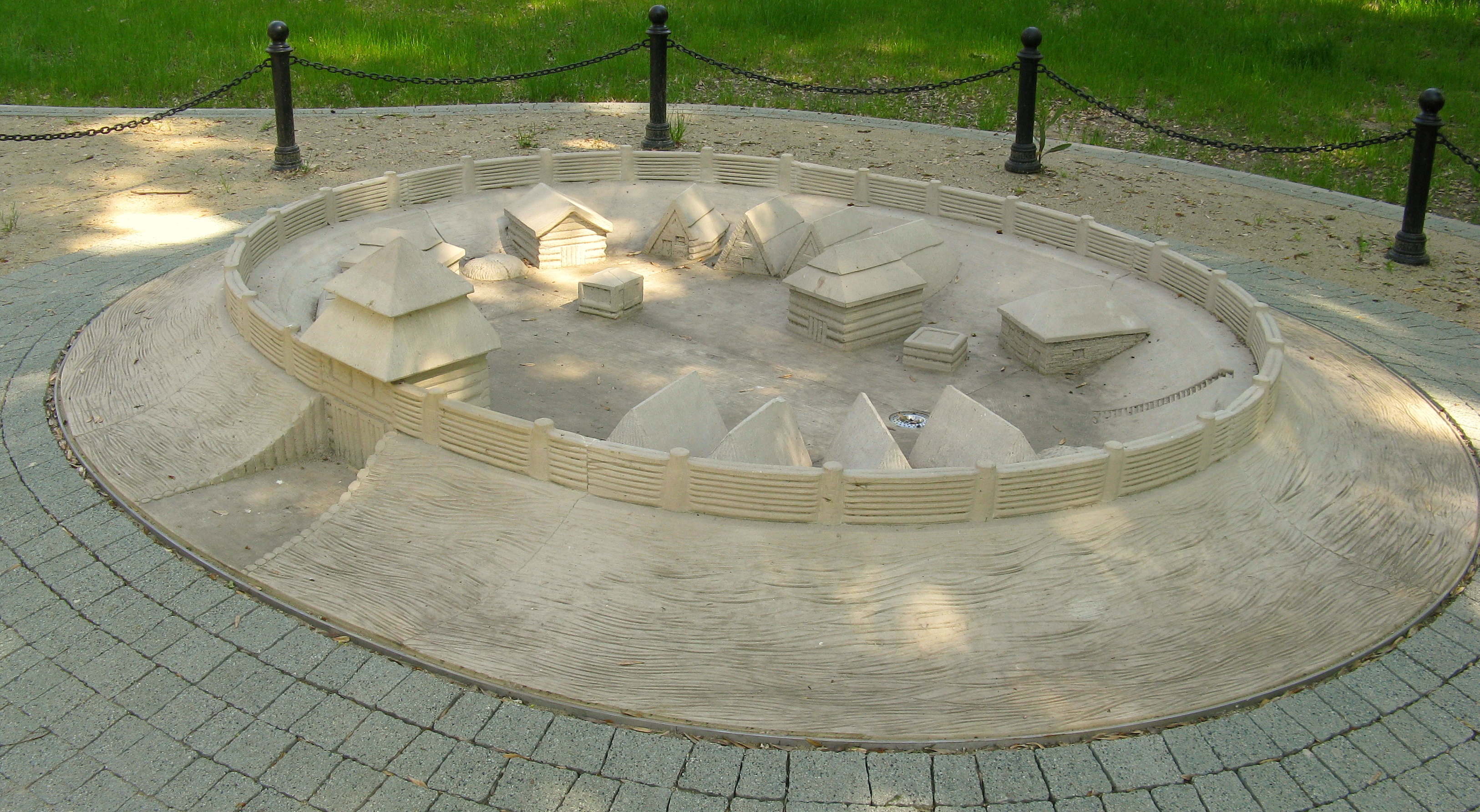 Model grodziska Barbarka w Serocku